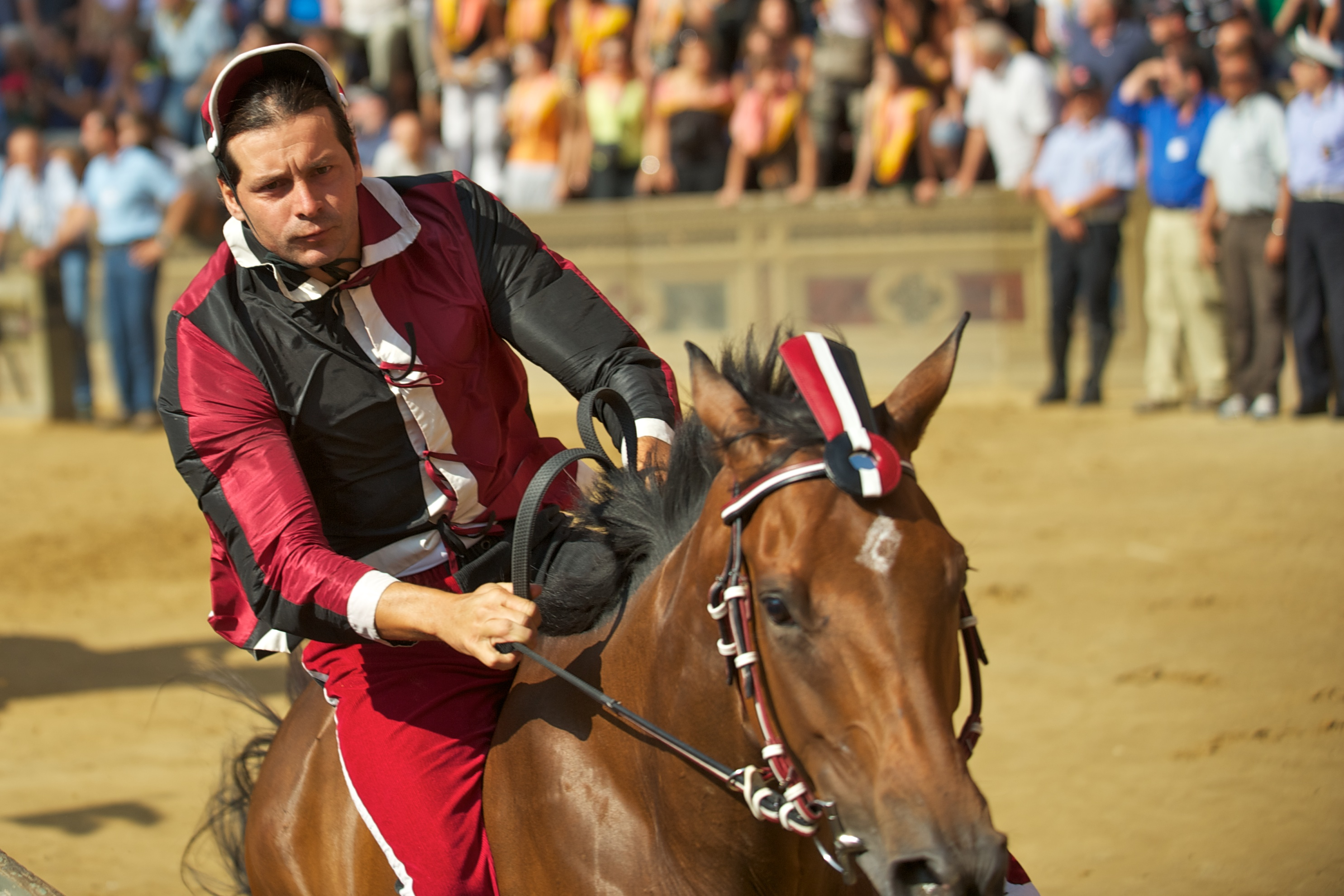 Civetta con Marrocula montato da Andrea Mari detto Brio.